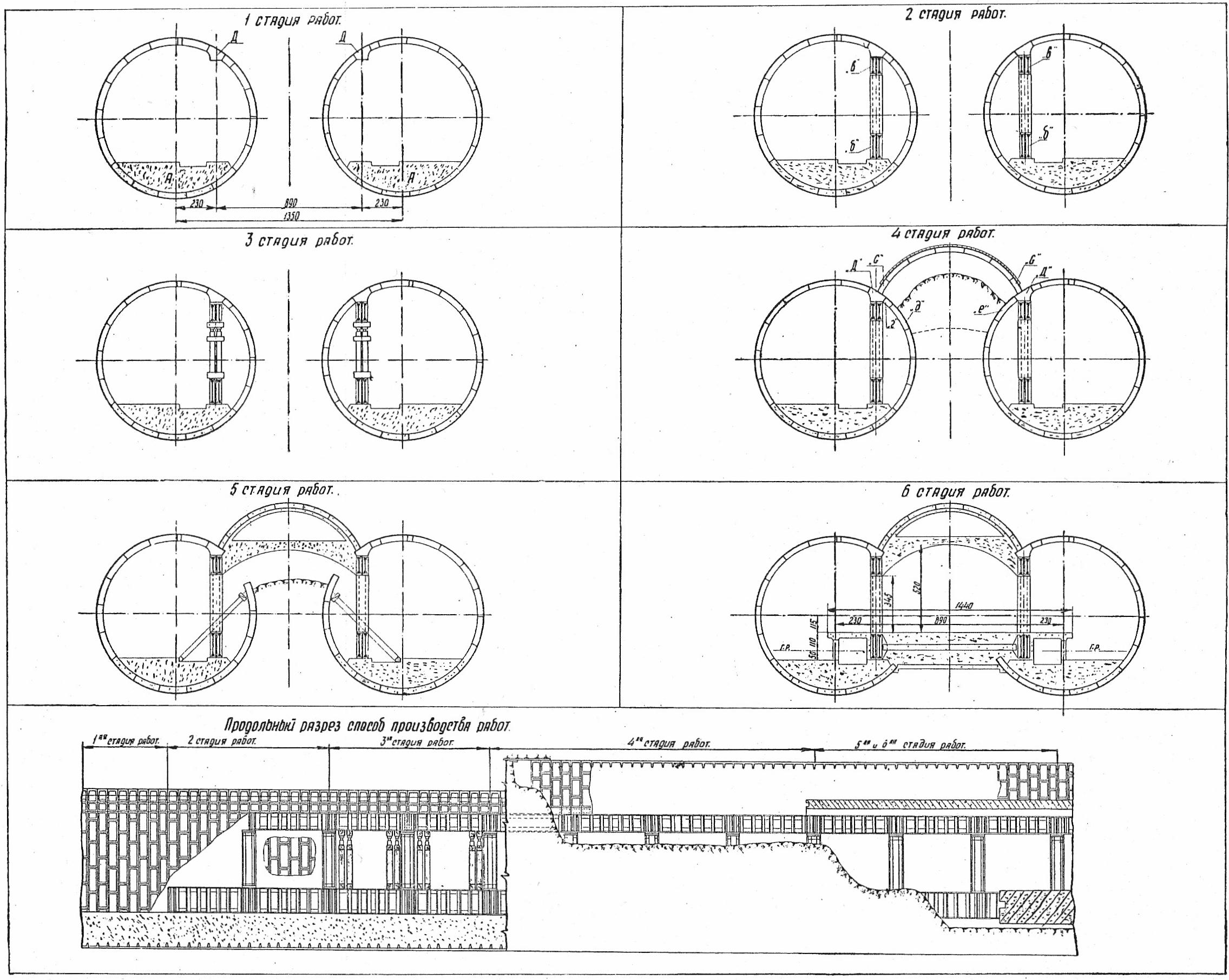 Схема сооружения станции "Маяковская"